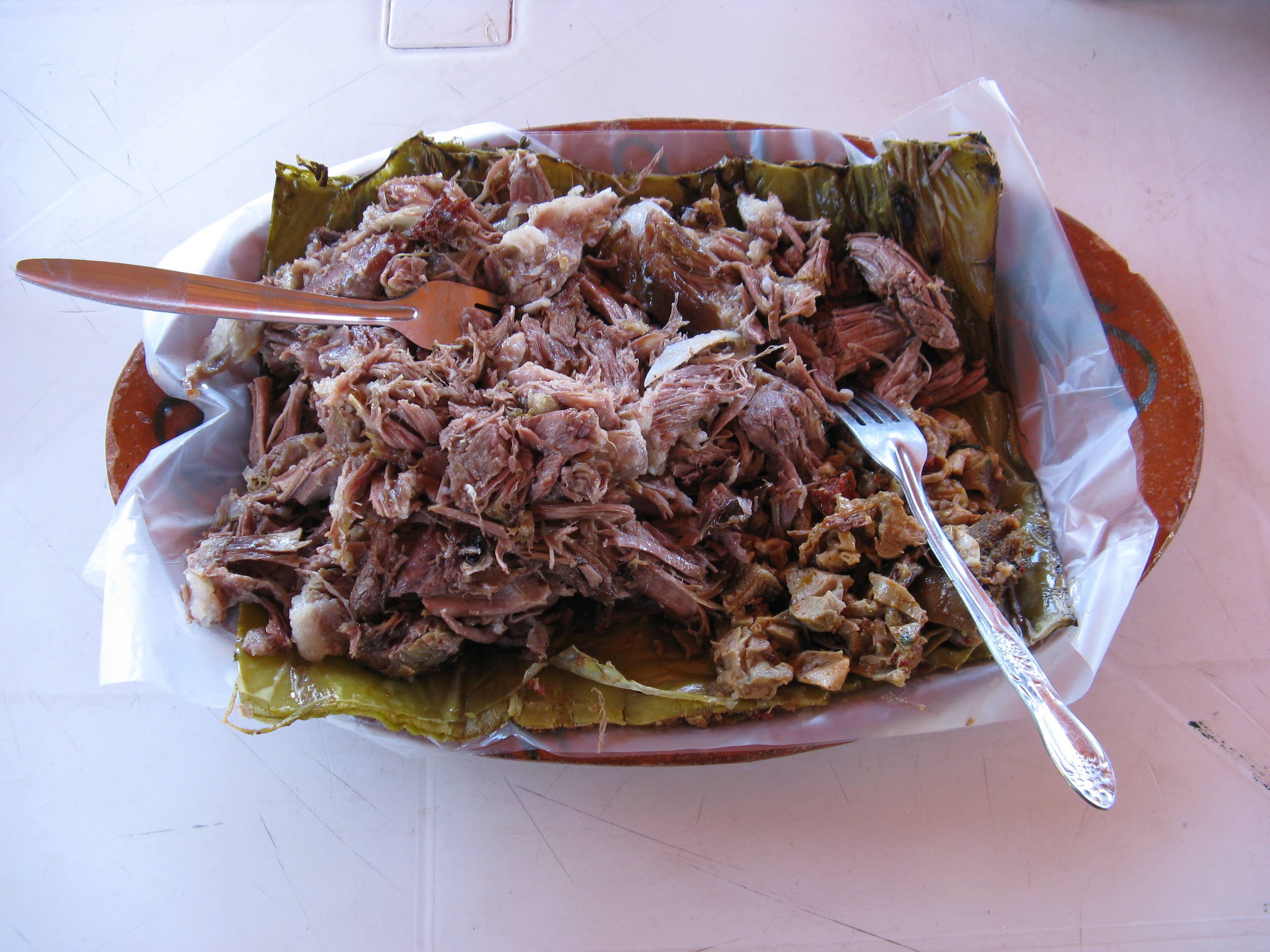 Plato de barbacoa, servido sobre penca de maguey, en Hidalgo, México.